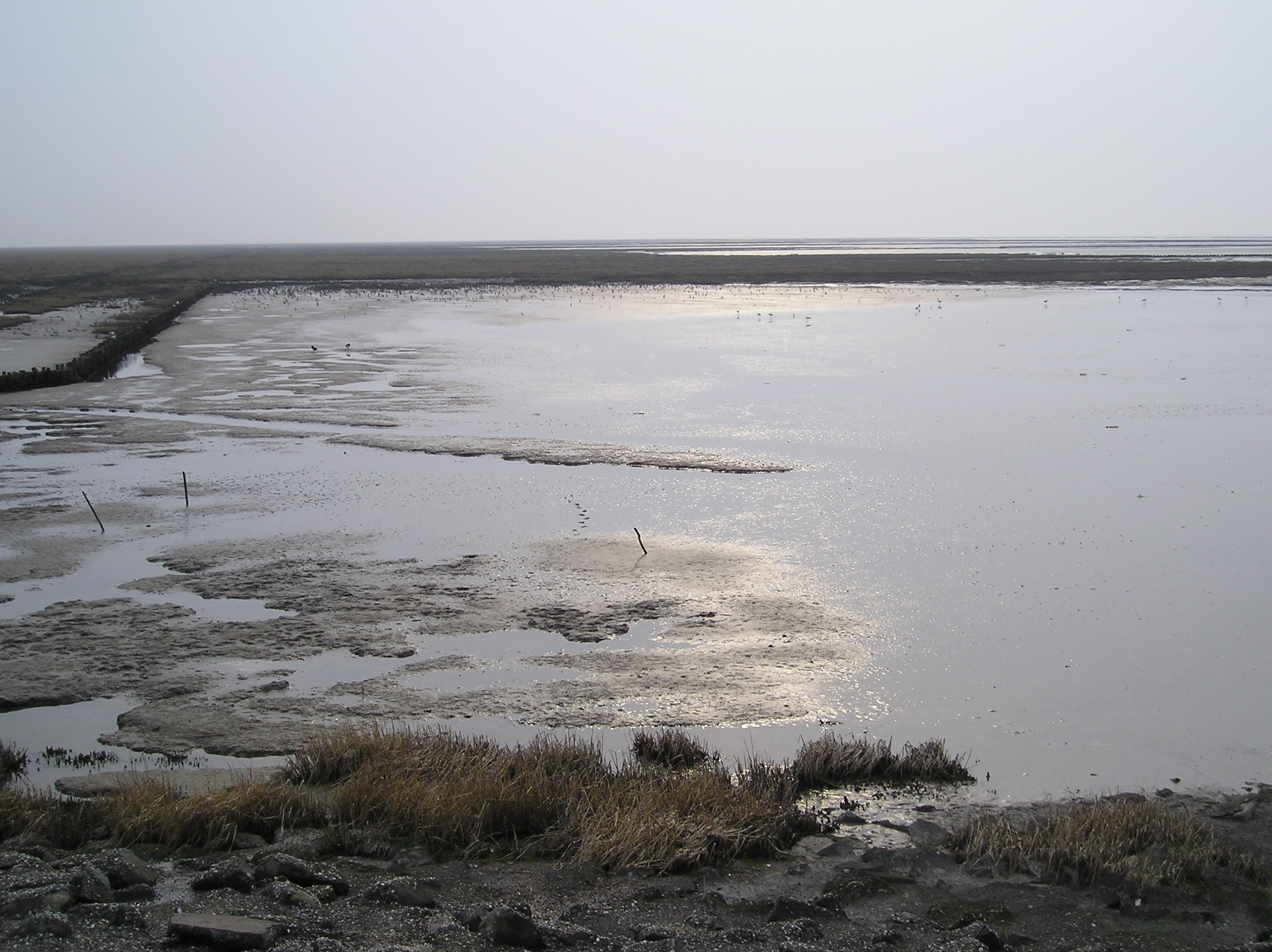 Morze Wattowe widziane z przystani promowej niedaleko Holwerd we Fryzji, Holandia Wadden Sea from ferry harbour near Holwerd in Friesland, Holland